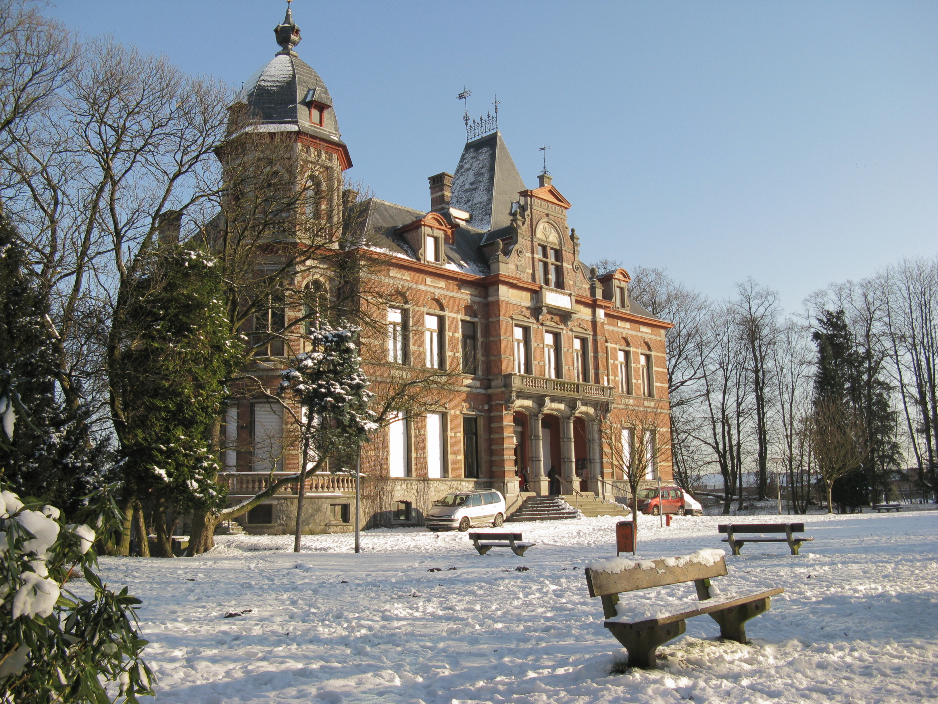 Kasteel op het stedelijk domein Claeys Bouuaert in Mariakerke, Gent.